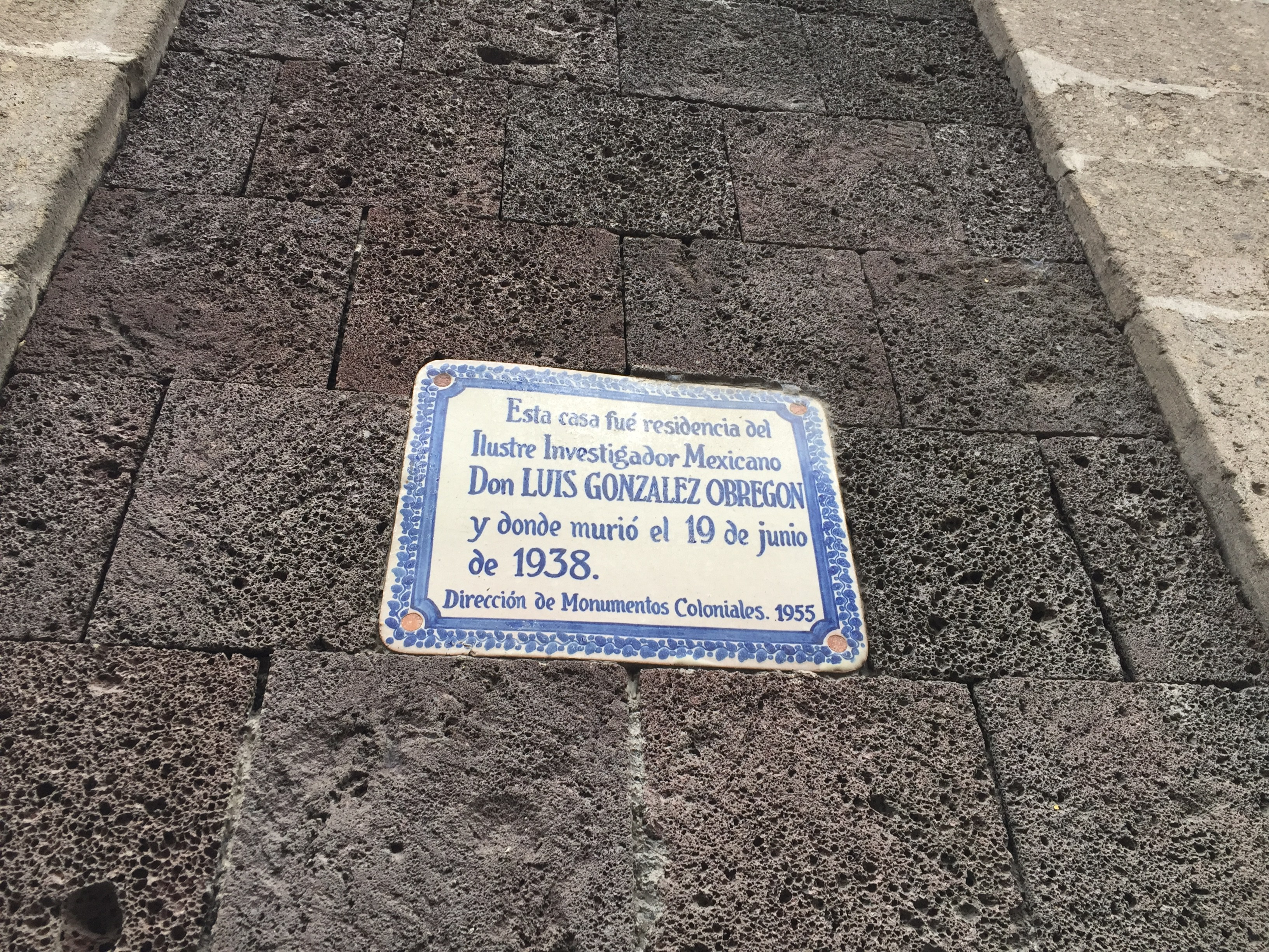 Escuela de Derecho Ponciano Arriaga en el centro